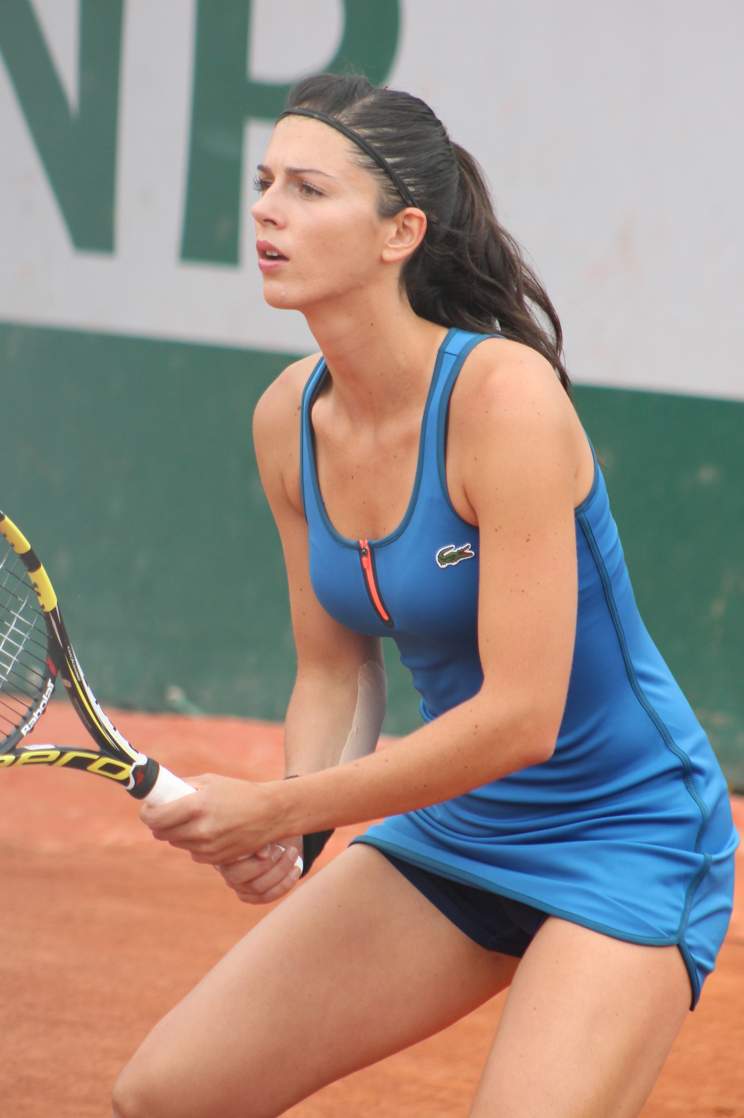 Sibille RG15 (6)